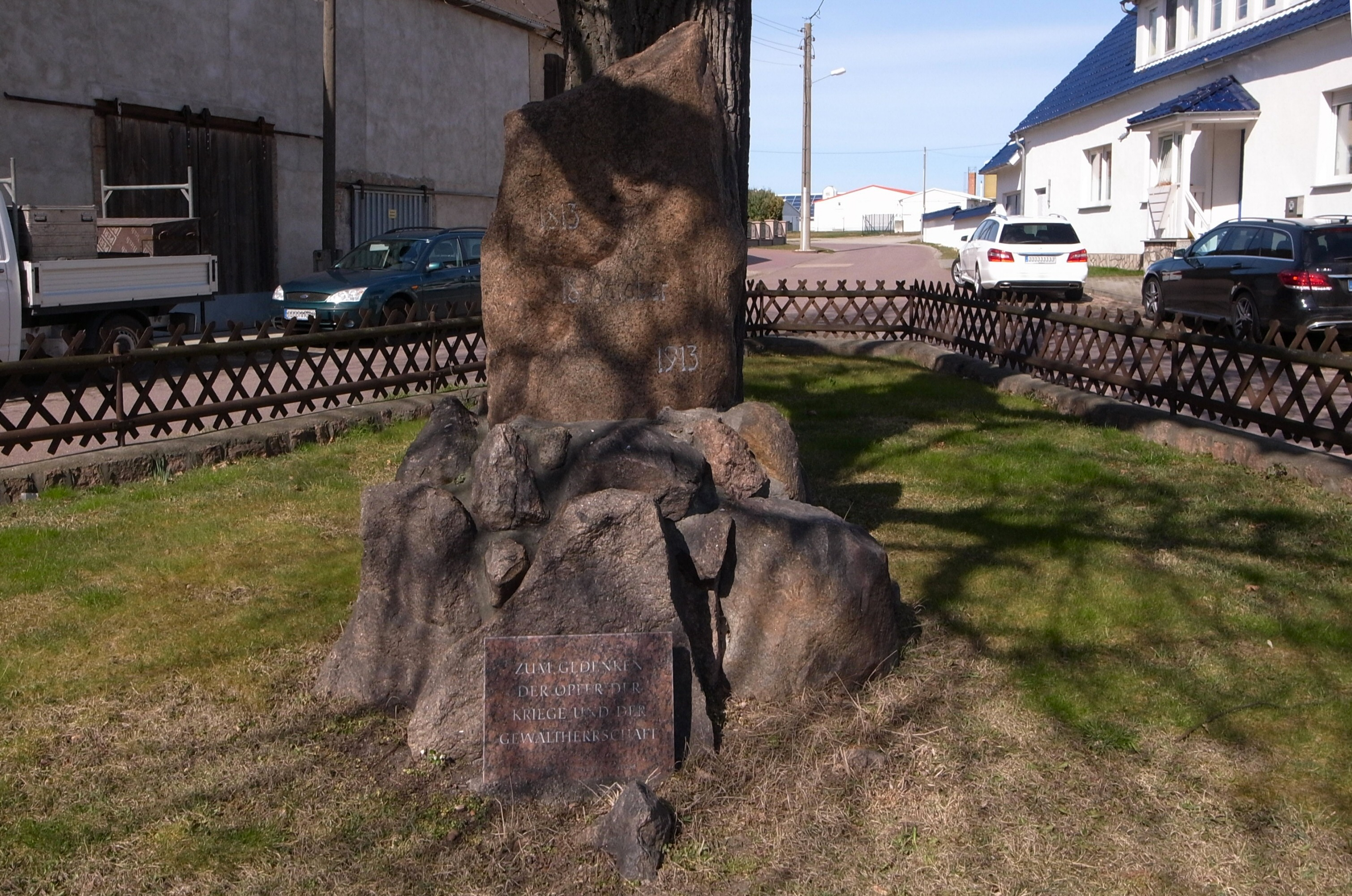 Gemeinde Osternienburger Land, Ortsteil Zabitz, Gedenkstein. (Baudenkmal im Denkmalverzeichniss Sachsen-Anhalt, Erfassungsnummer: 094 97238 000 000 000 000 [1])